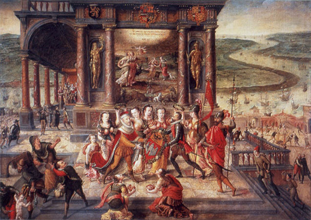 Allegorie auf die Übernahme von Antwerpenlabel QS:Lde,"Allegorie auf die Übernahme von Antwerpen"